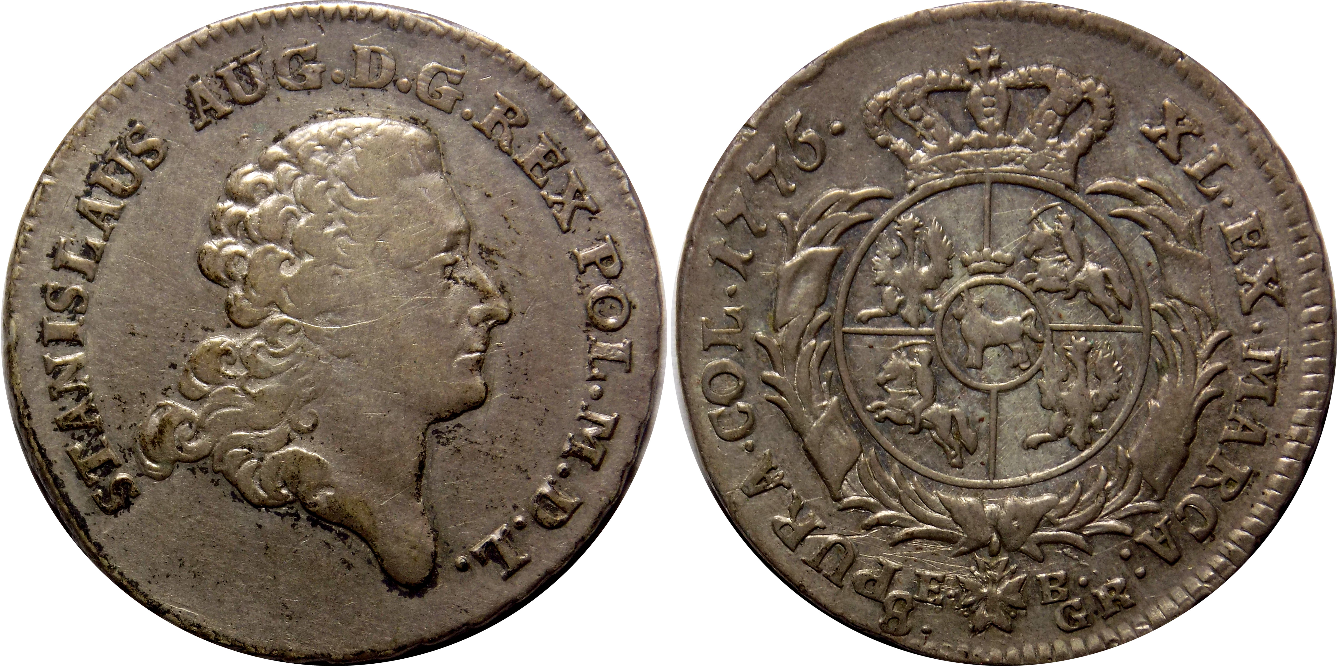 Dwuzłotówka koronna 1775